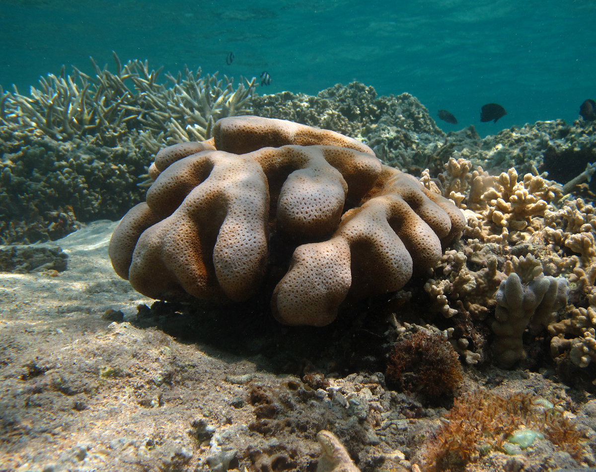 Une colonie de corail Cyphastrea serailia à la Réunion.